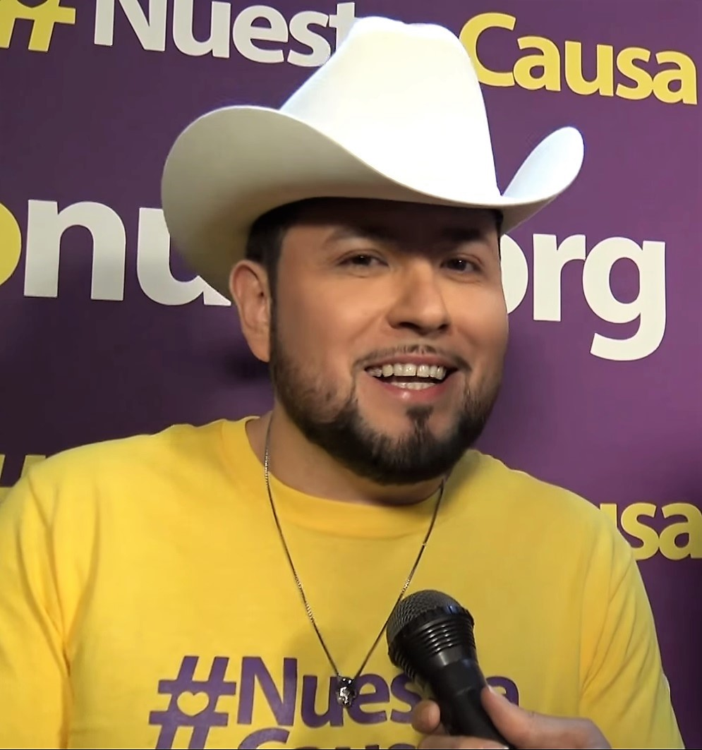 La vida secreta de Roberto Tapia, finalmente revela lo que mantenía callado Dulce Osuna &